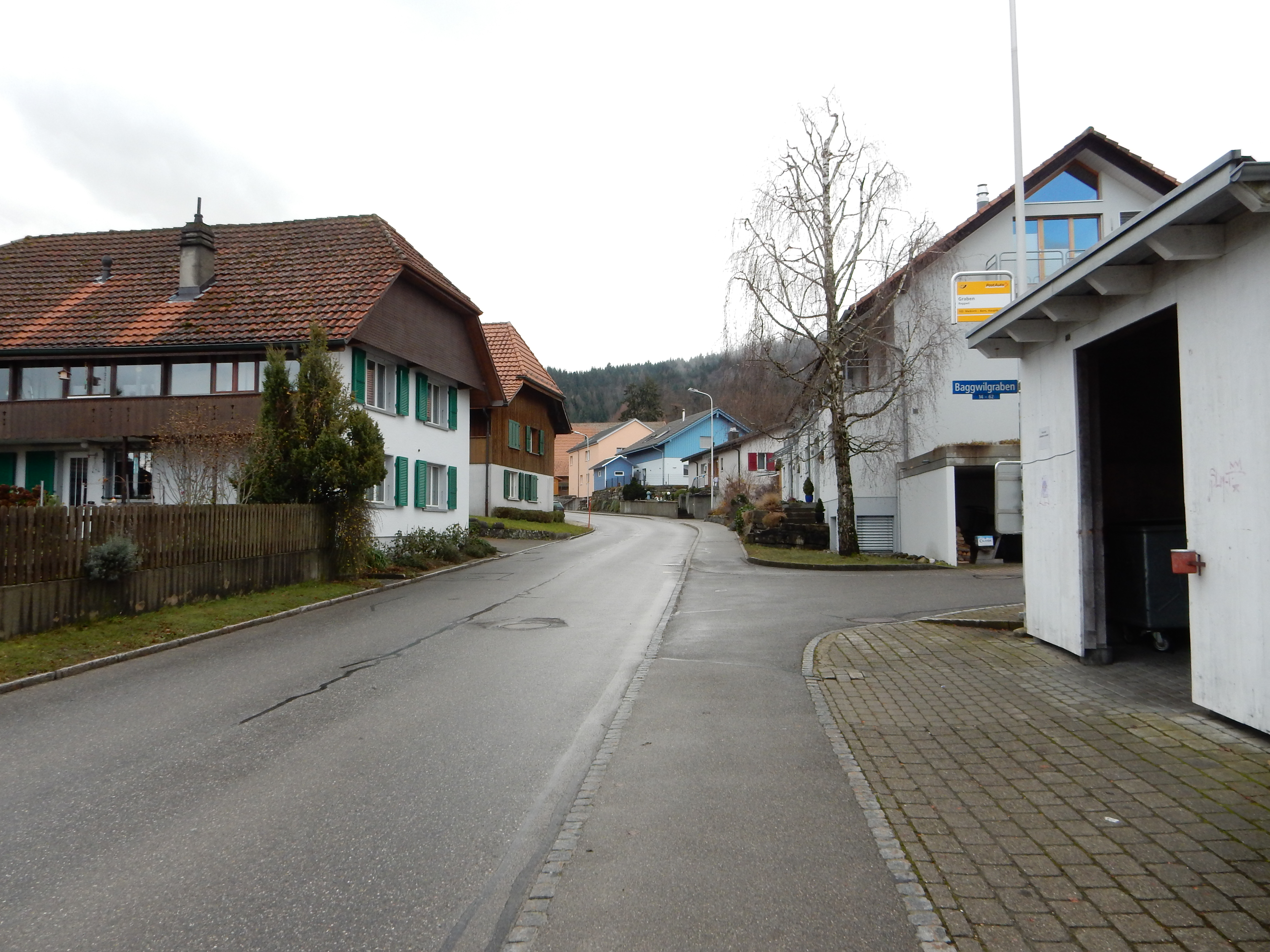 Baggwilgraben, Gemeinde Seedorf (Schweiz)